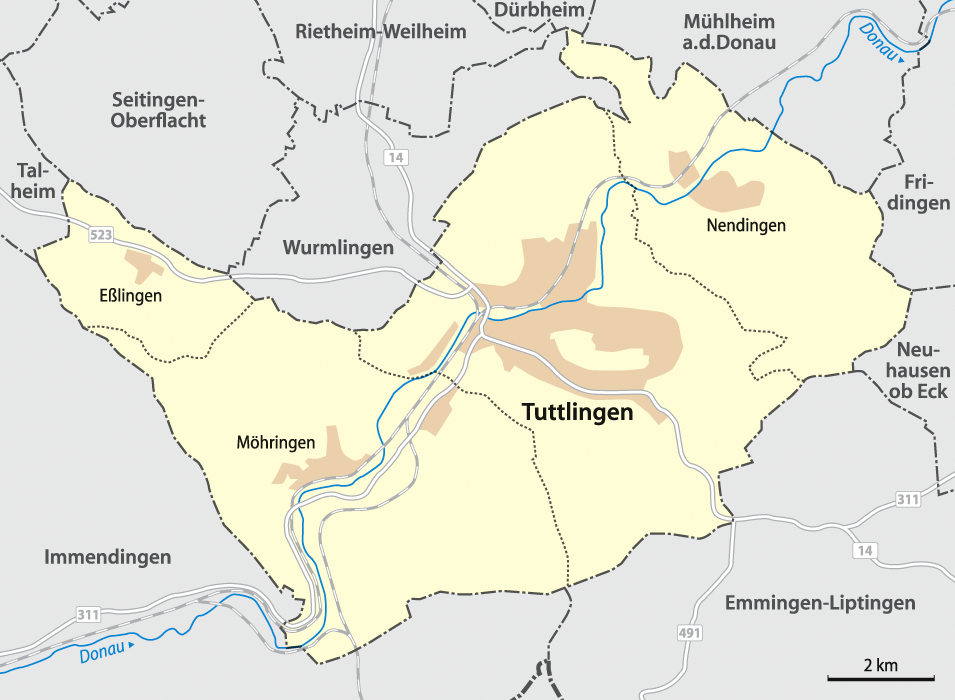 Karte der Ortsteile von Tuttlingen